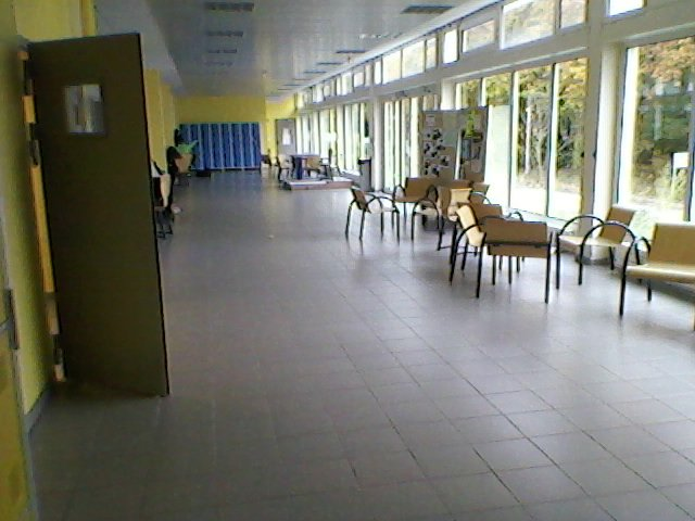 Lycée en forêt, Montargis, Loiret, Centre, France